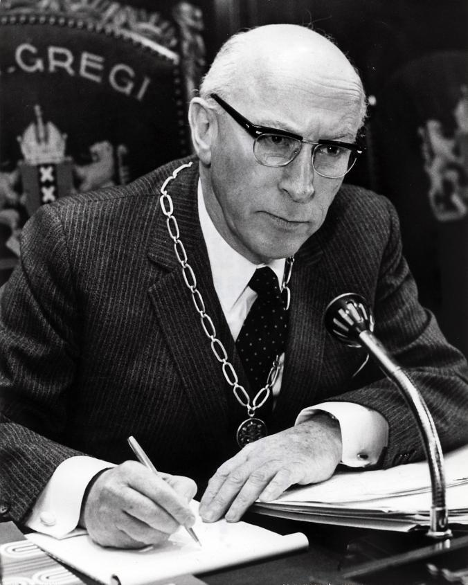 Samkalden, I. (PvdA). Begrotingsbehandeling Amsterdamse gemeenteraad. Burgemeester Samkalden maakt aantekeningen van de opmerkingen van raadsleden over het onderwerp "bestuursorganisatie" dat onder zijn verantwoordelijkheid valt. Nederland, Amsterdam, 11